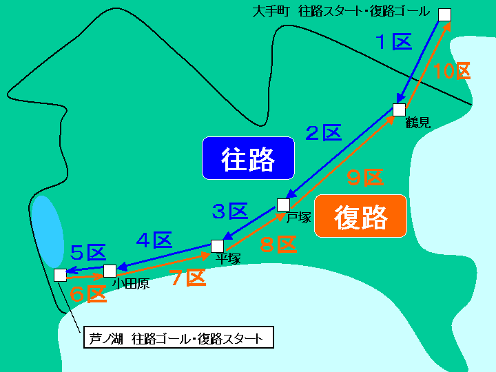 箱根駅伝のコースマップです。